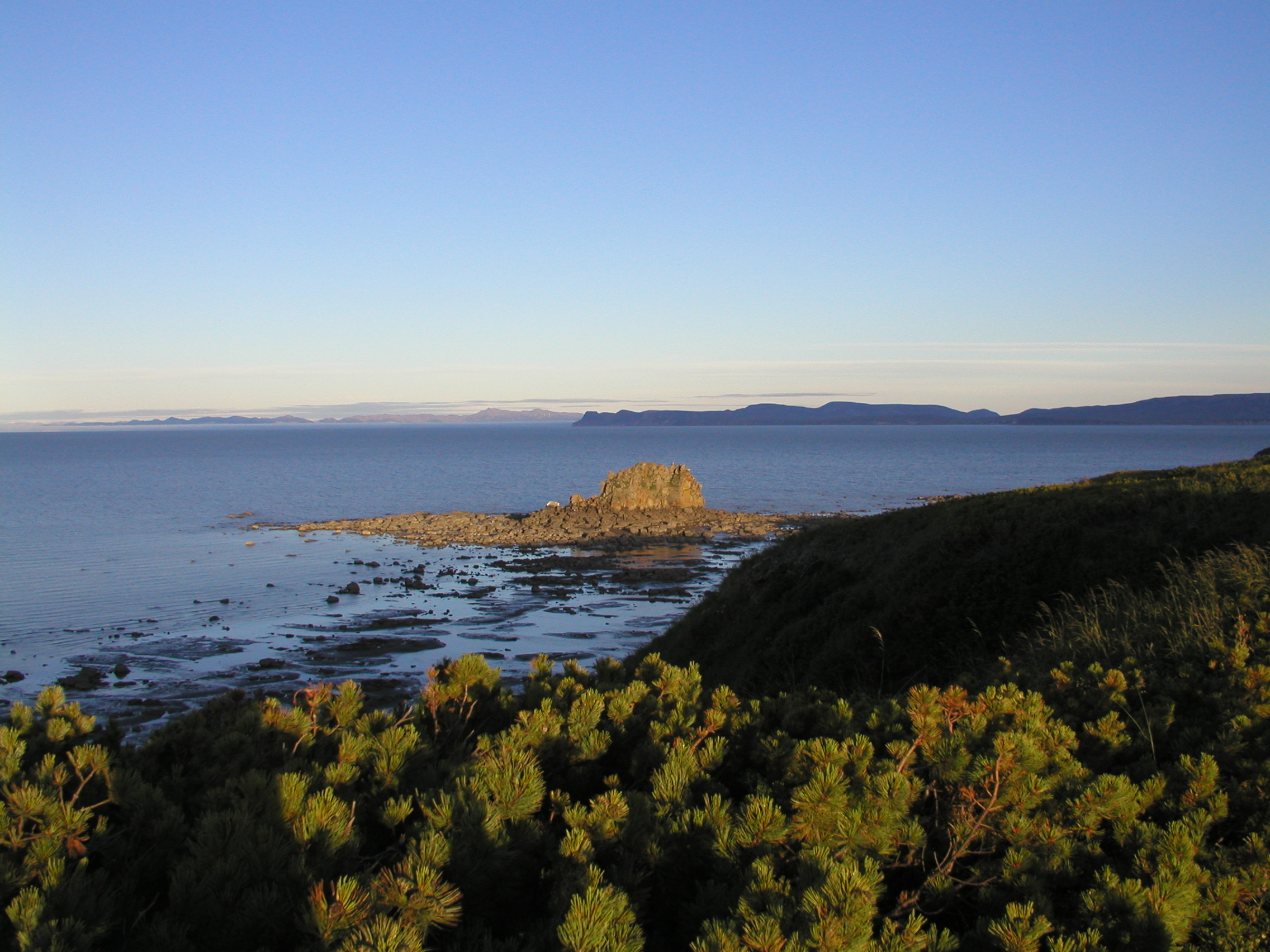 Пенжинский прибрежный, Пенжинский район This image is related to the protected area of Russia number 4110148